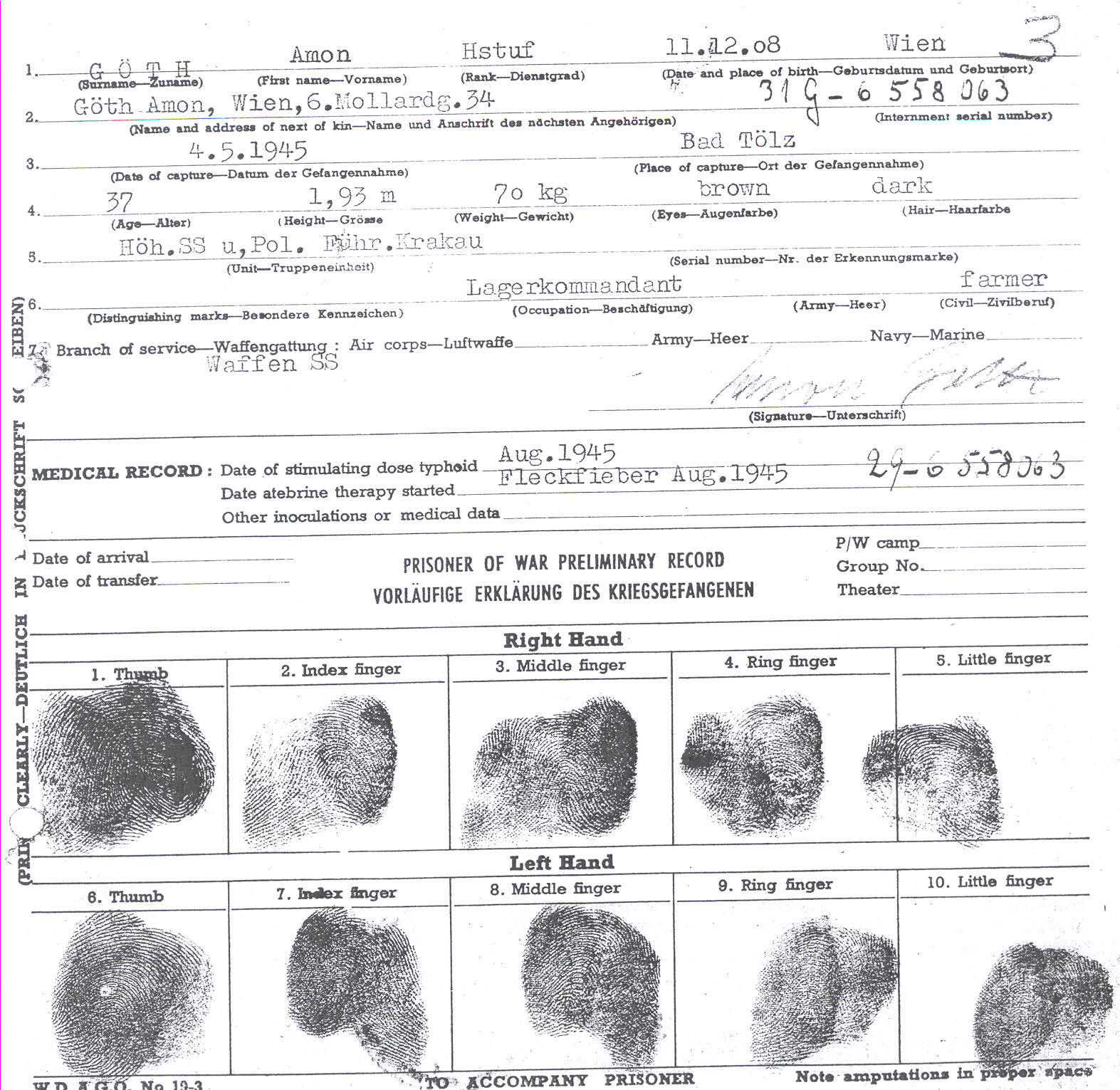 Identifikation Amon Göths als Prisoner of War